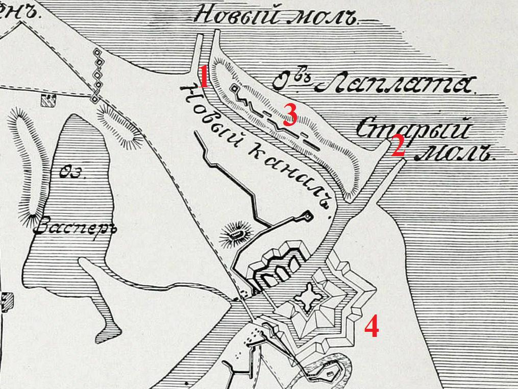 Plan Gdańska w 1734 r.: 1-Kanał Portowy, 2-stare ujście Wisły, 3-Westerplatte (jeszcze jako wyspa), 4-Twierdza Wisłoujście. Po lewej jezioro Zaspa.